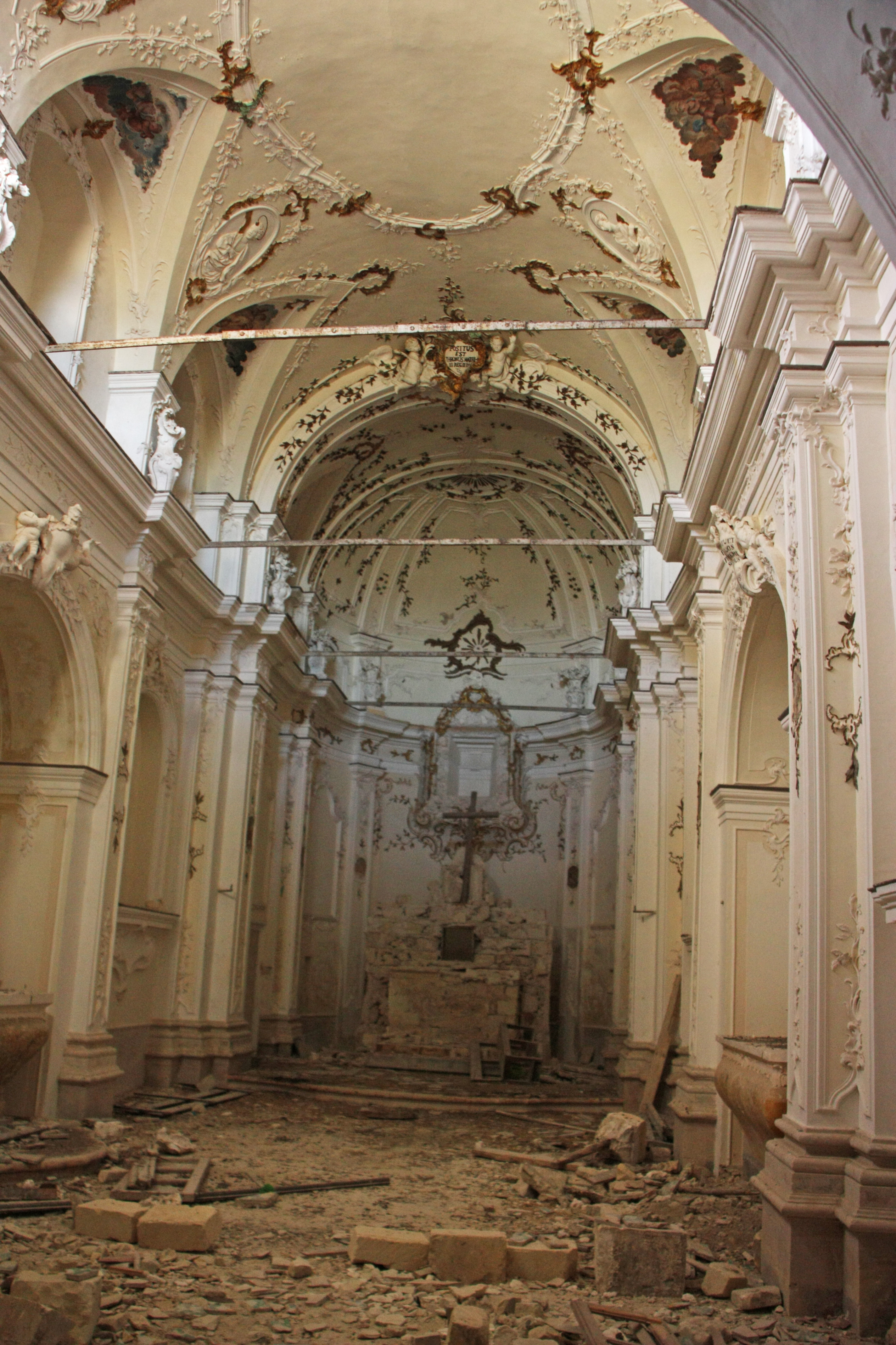 Interno della chiesa